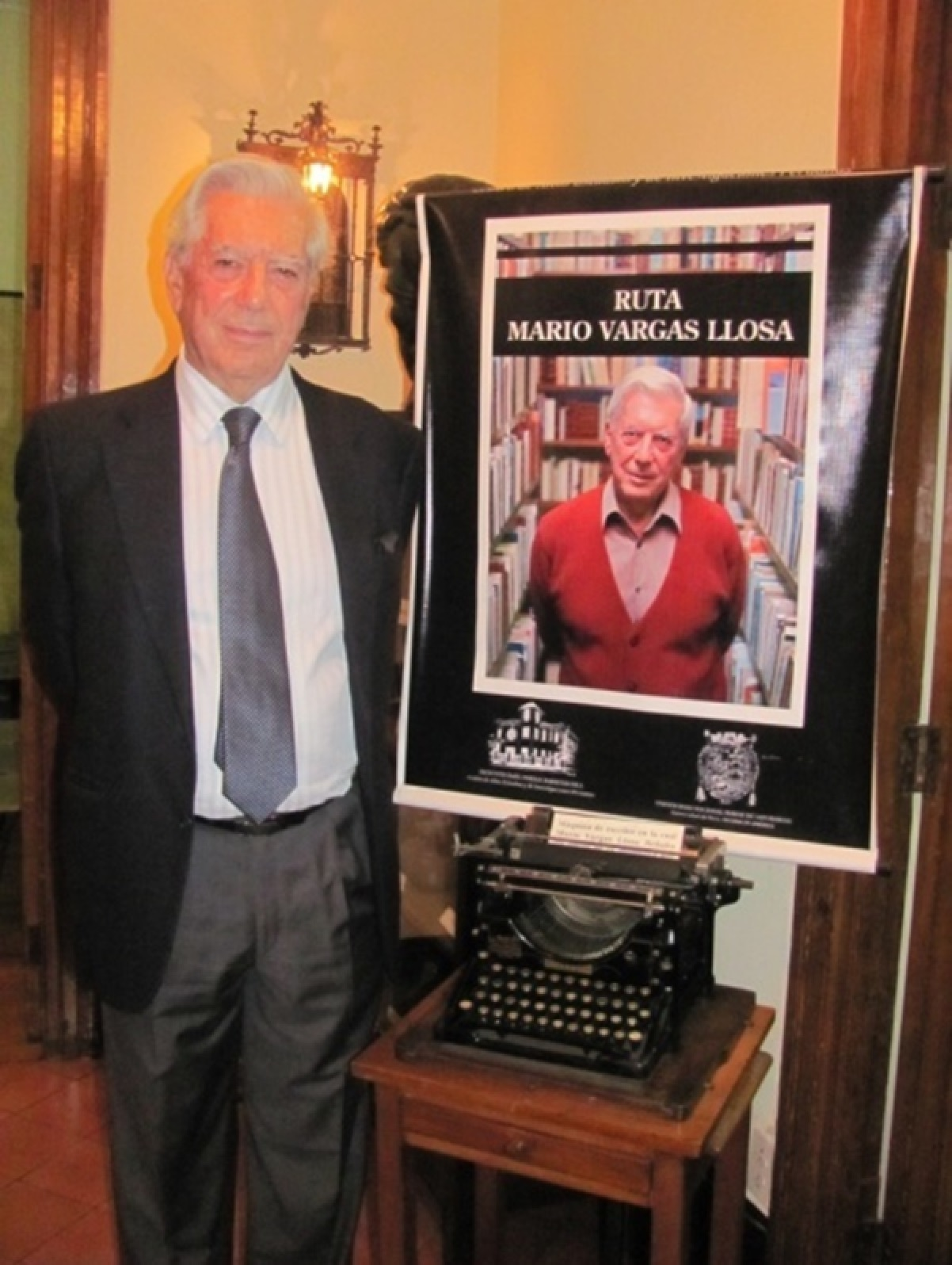 Instituto Raúl Porras Barrenechea Foto tomada por: Rocío Hilario, administradora del Instituto Raúl Porras Barrenechea.